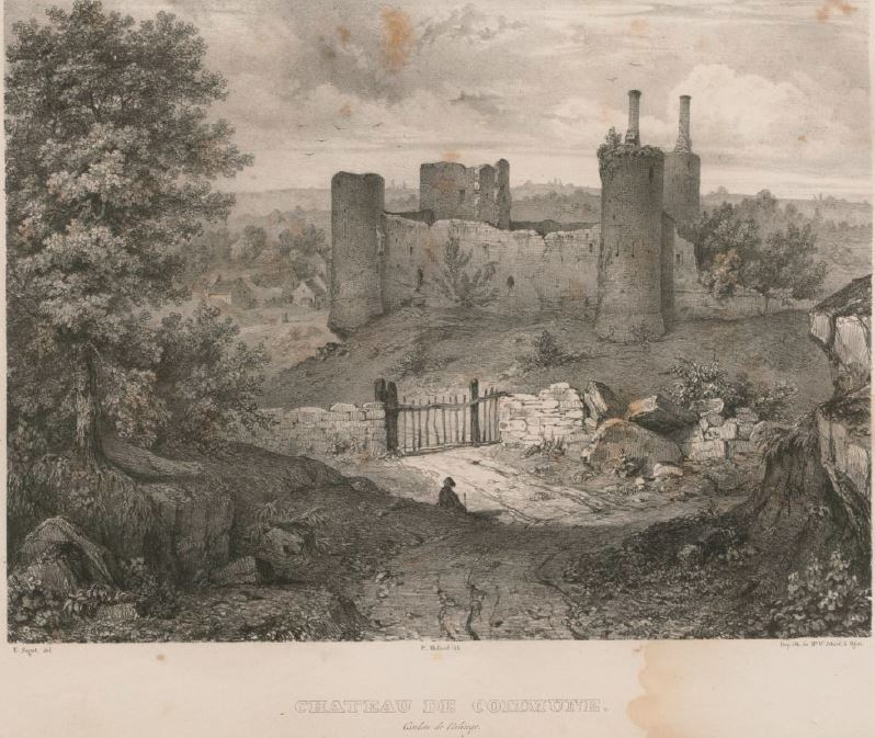 Château de Commune à Martigny-le-Comte (Saône-et-Loire). Dessin issu de Voyage pittoresque en Bourgogne ou Description historique et vues des monuments antiques, modernes et du Moyen âge.... Partie 2, sous la direction de Charles-Hippolyte Maillard de Chambure, Gabriel Peignot et Boudot Éditeur : impr. Vve Brugnot 1835 dessin E. Sagot